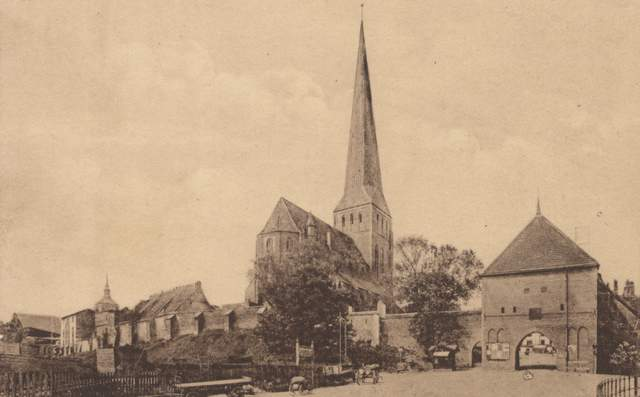 Blick auf die Petrikirche in Rostock